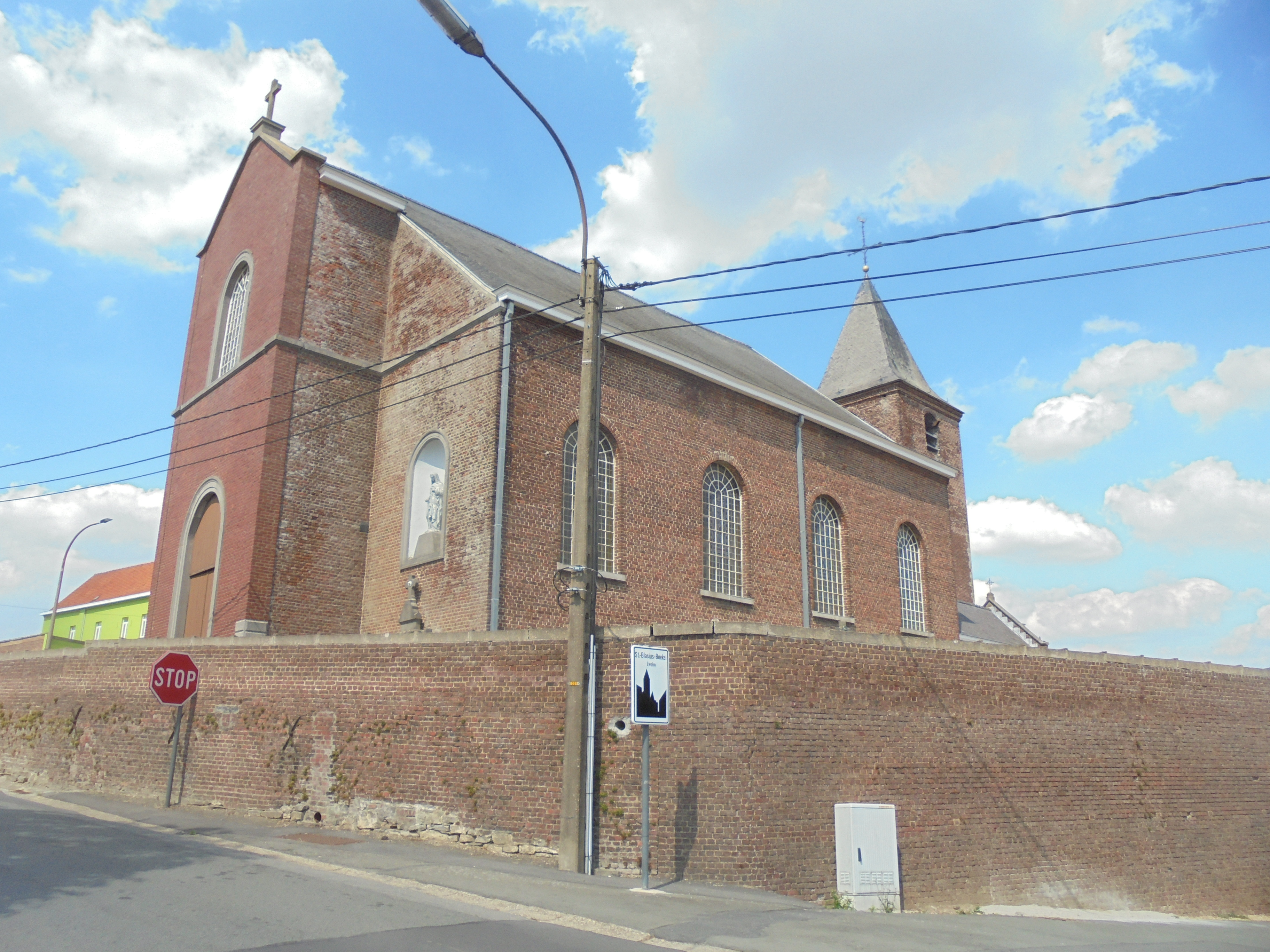 Sint-Blasiuskerk - Boekelbaan - Sint-Blasius-Boekel - Zwalm - Oost-Vlaanderen - België